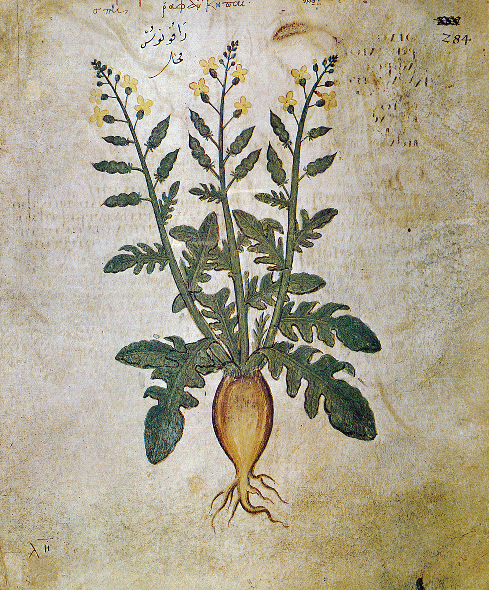 Rettich (Gartenrettich) aus dem Wiener Dioskurides, Blatt 284r